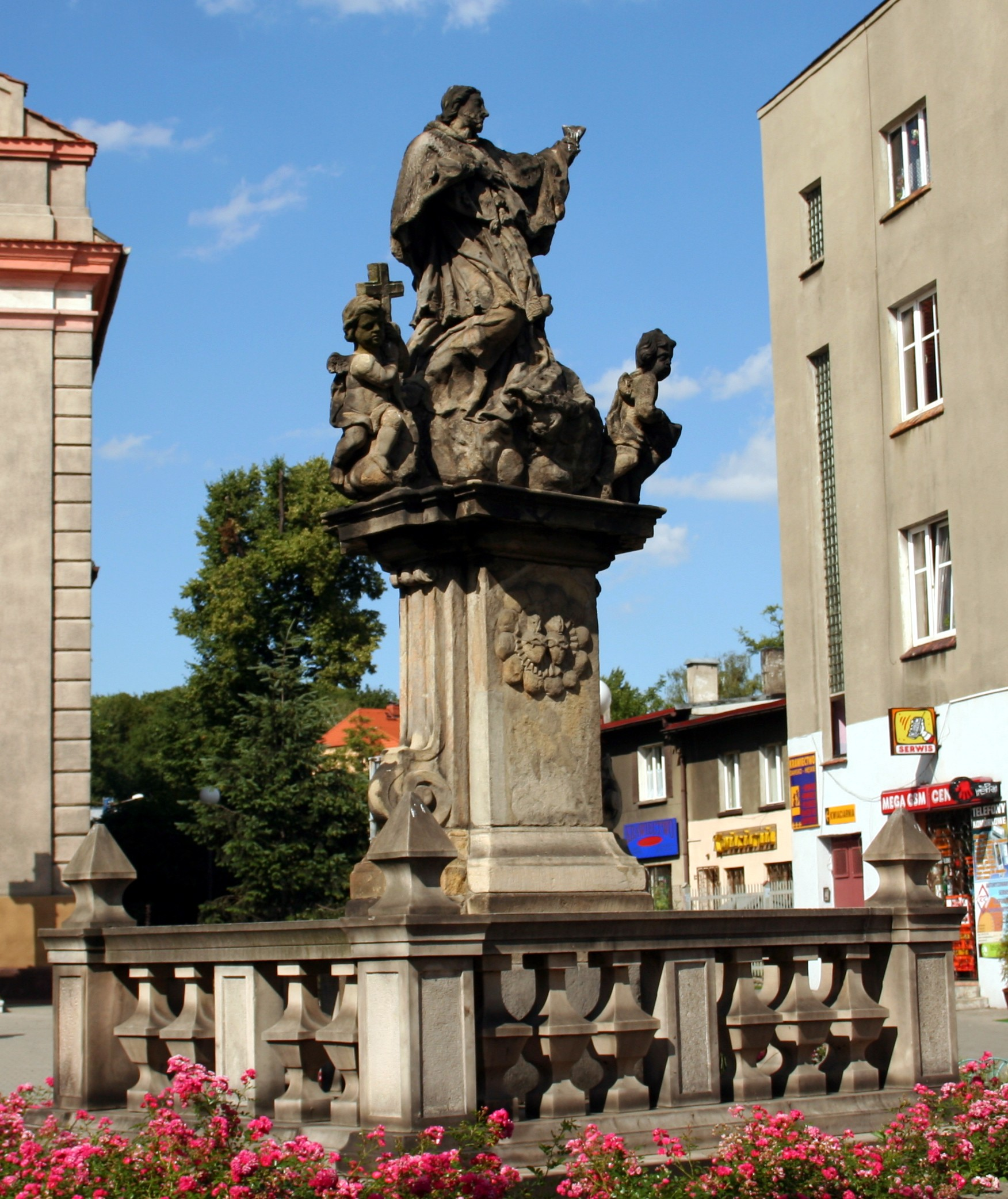 figura Jana Nepomucena przed kościołem Matki Boskiej Bolesnej w Rybniku